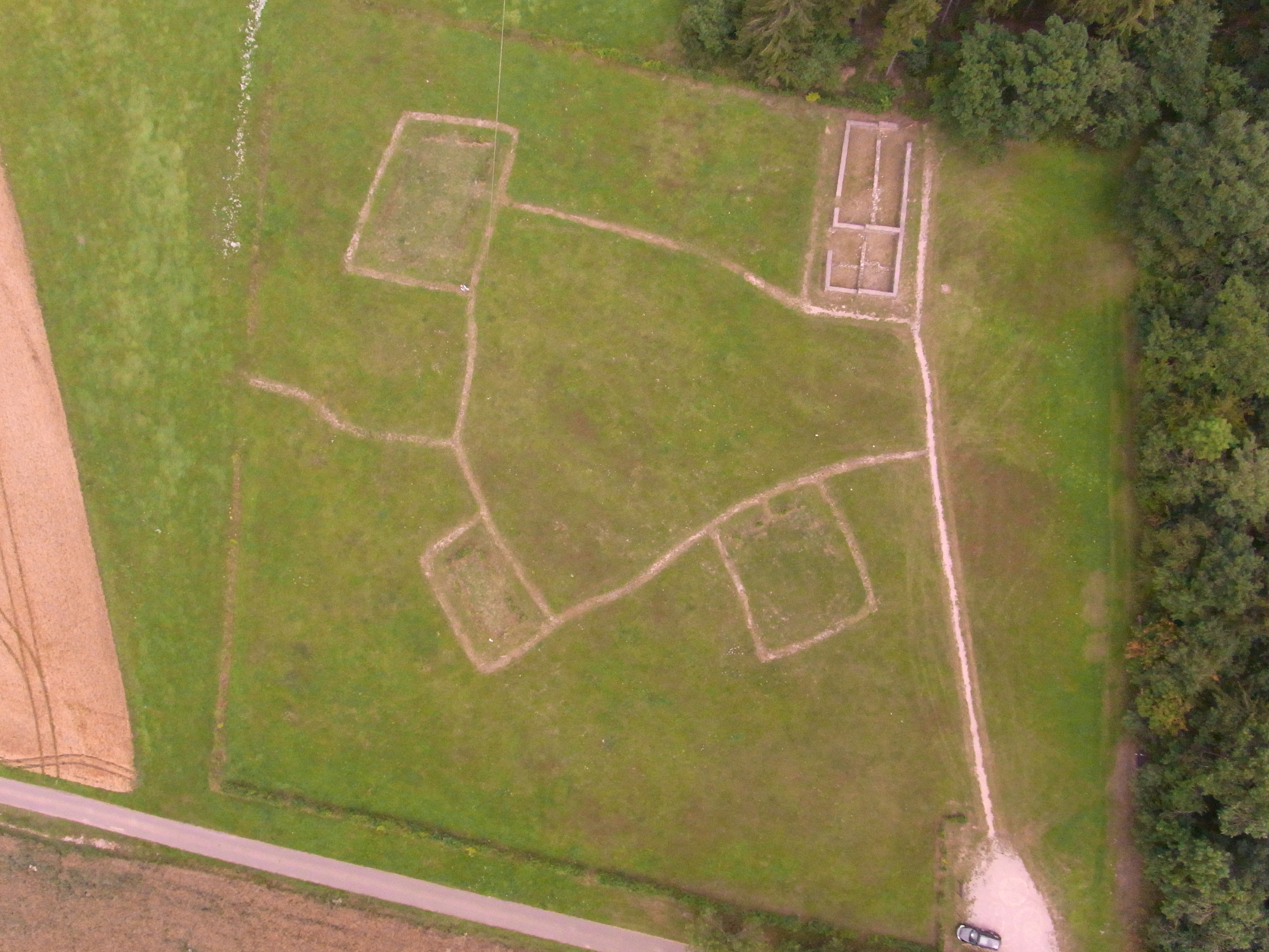 Kite aerial photography - Drachenluftbild des Hauptgebäudes und der Nebengebäude.